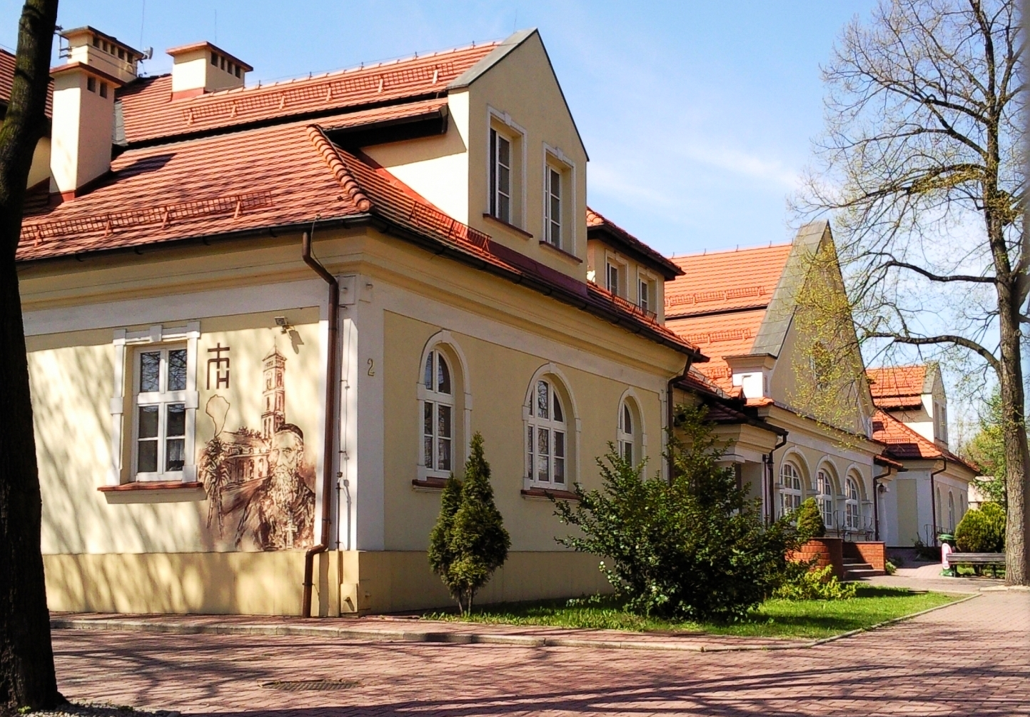 Dom Zakonny Kongregacji Misjonarzy z Mariannhill. Już w latach międzywojennych istniały domy Zgromadzenia w Katowicach i we Wrocławiu. Misjonarze rozpowszechniali czasopisma misyjne w języku polskim, kształcili młodzież, formowali młodych zakonników, pomagali w parafiach, głosili rekolekcje. Zgromadzenie istniało do 1956 roku w Skorogoszczy na Opolszczyźnie. Powrót zakonników do Polski w 1995 roku wpisał się na trwałe w historię Zgromadzenia, a także stał się kontynuacją działalności misyjnej rozpoczętej już przed II wojną światową przez brata Konstantego Mielewskiego w Katowicach. Naszym celem jest – poprzez modlitwę, pracę i obecność – wzmacnianie świadomości misyjnej Kościoła. Odczytując potrzeby Kościoła lokalnego, angażujemy się w pracę z młodzieżą, działalność duszpasterską (rekolekcje, misje, pomoc w parafiach), edukacyjną (katechizacja, nauczanie i wychowywanie dzieci i młodzieży), kulturalną i charytatywną. Prowadzimy też Dom Młodzieżowy z miejscami noclegowymi dla różnego typu grup.